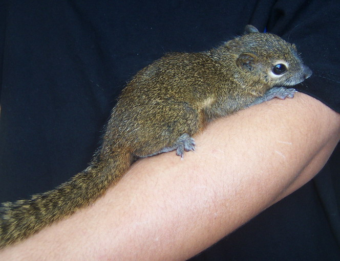 Callosciurus notatus - Plantain squirrel, from Darmaga, Bogor, Indonesia.